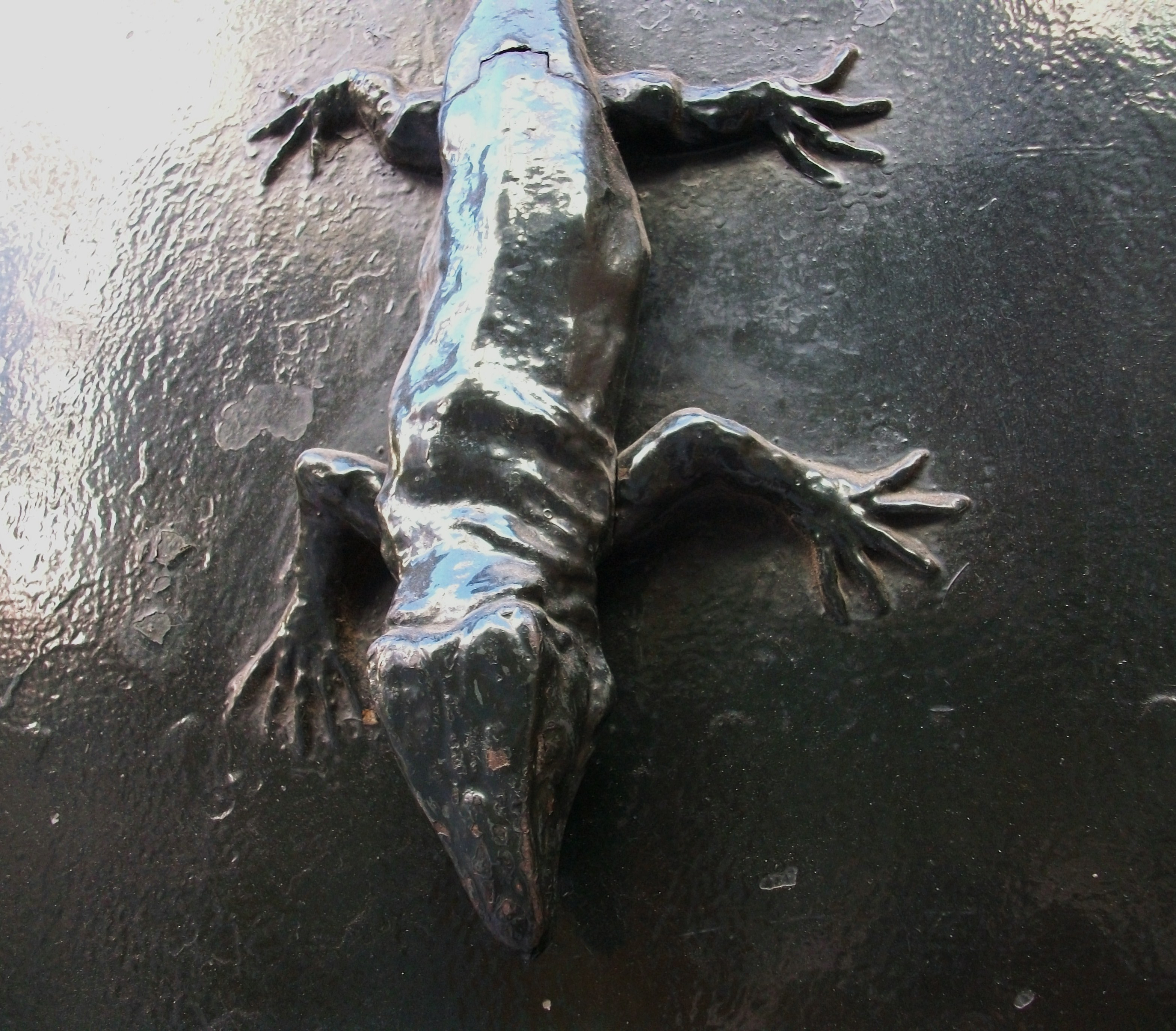 Fardatxo de la casa del Pavo d'Alcoi.